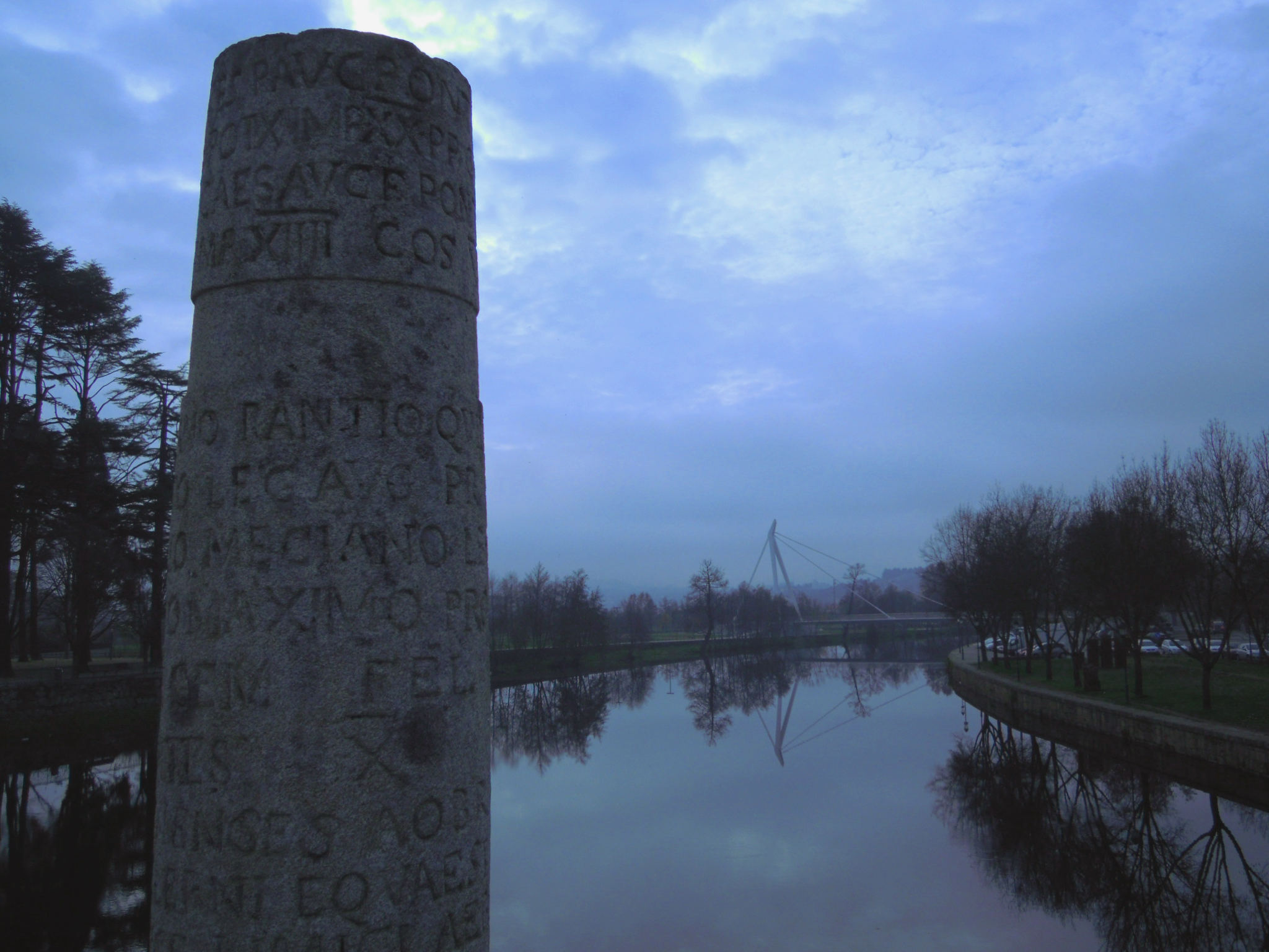 Padrón dos pobos, na ponte romana sobre o río Támega en Chaves.